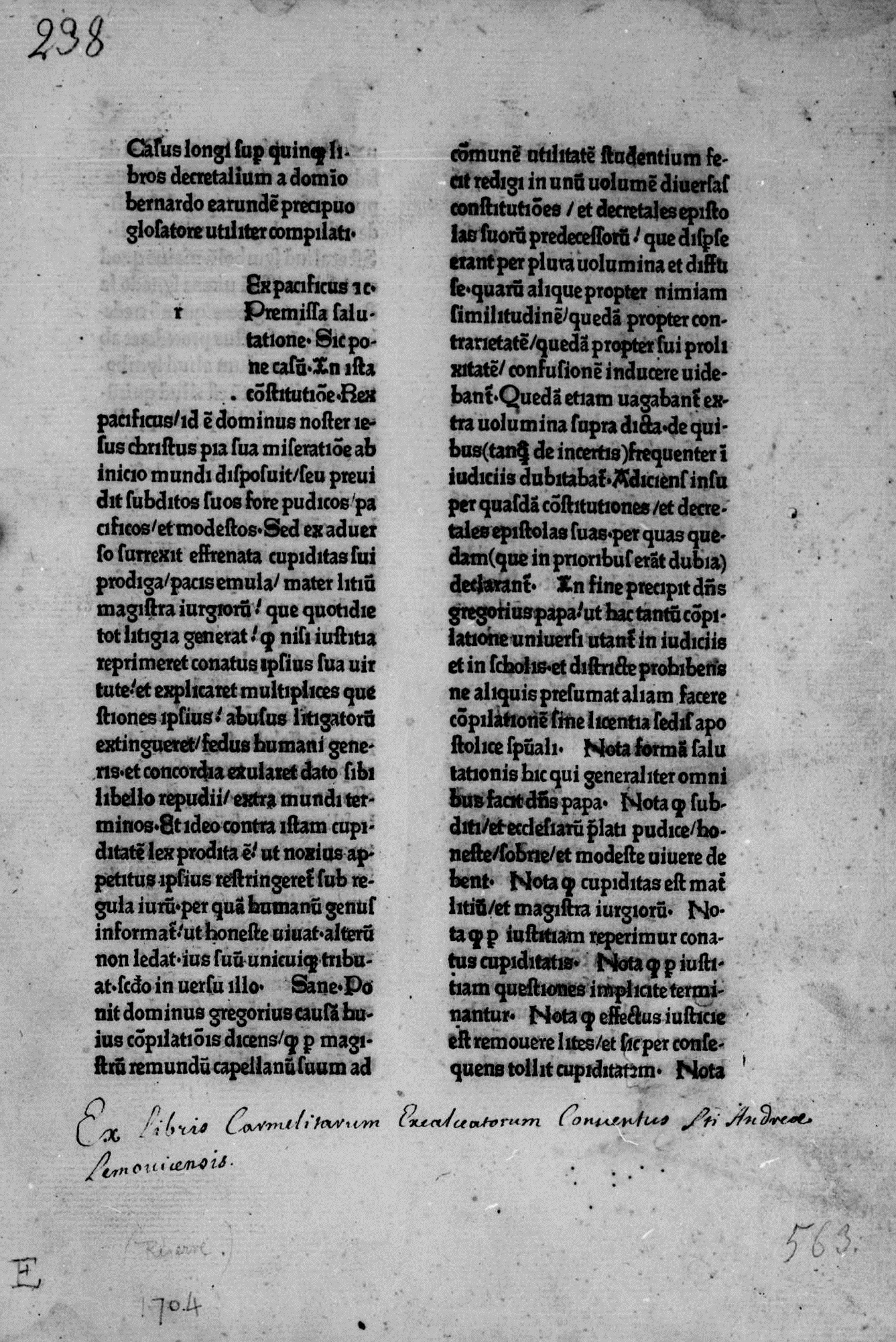 Carta a1r